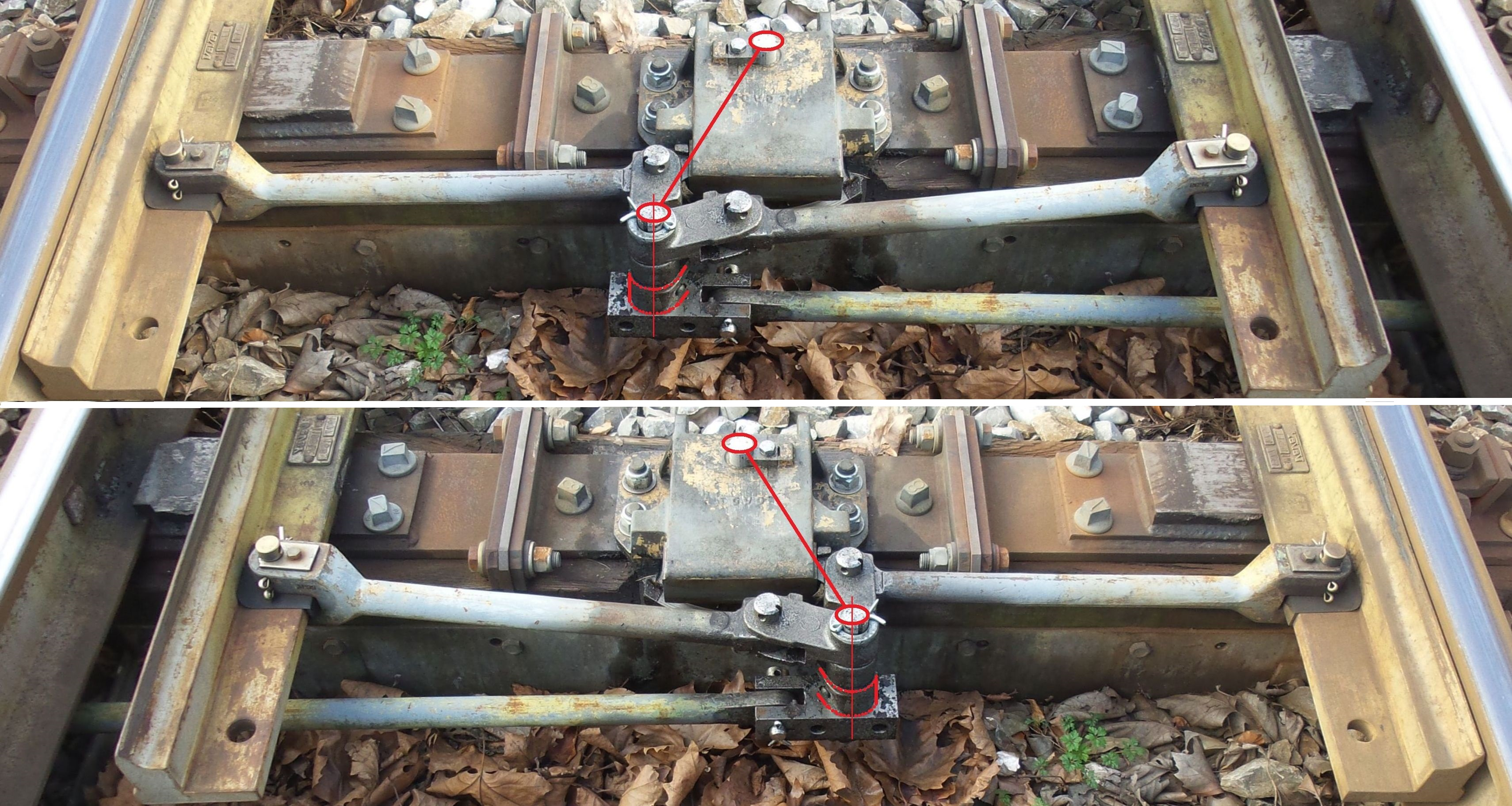 Jüdel-Verschluss einer Eisenbahnweiche